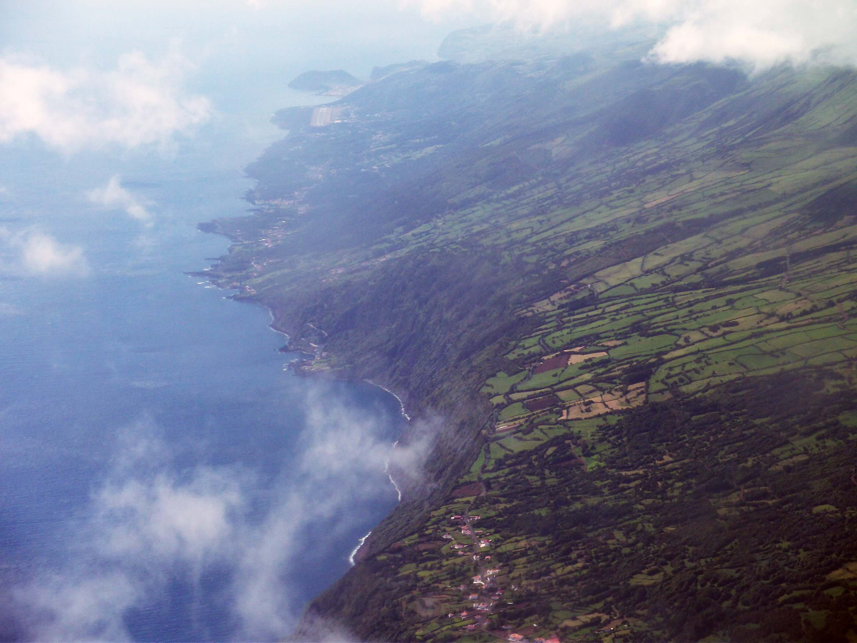 Ribeira Seca, vista parcial, ilha de São Jorge, Açores, Portugal